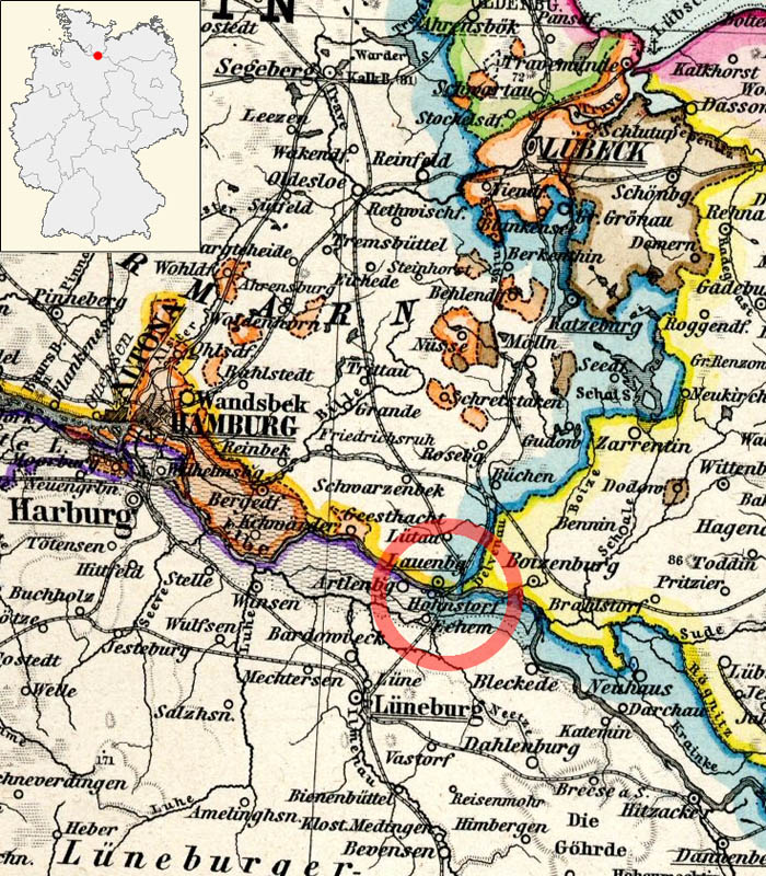 Elbquerung der Bahnstrecke Lübeck–Lüneburg bei Lauenburg.